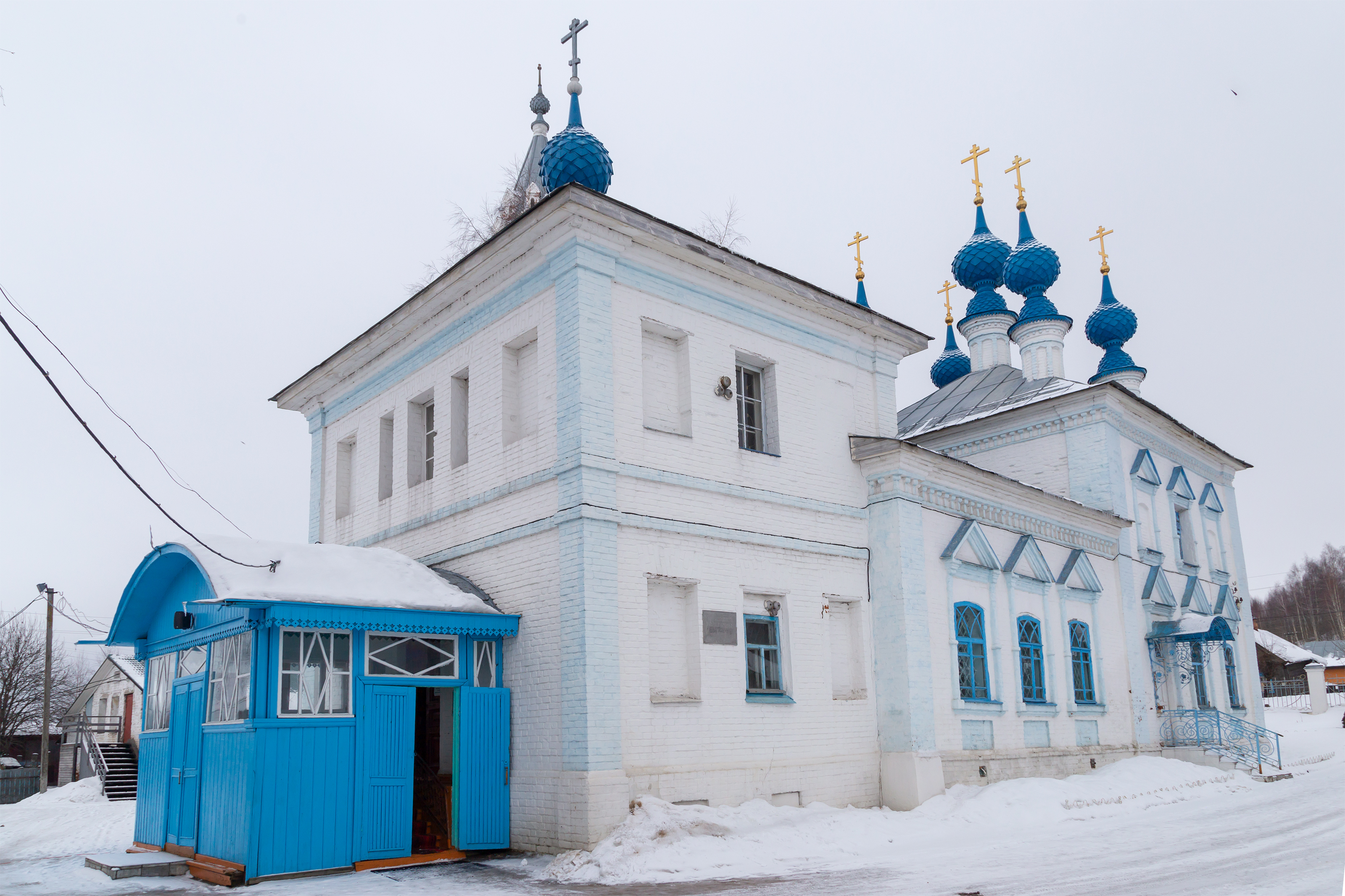 Церковь Введения во храм Пресвятой Богородицы: улица Свердлова, 20, Галич, Костромская область